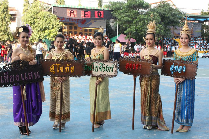 ภาพ กีฬาสี